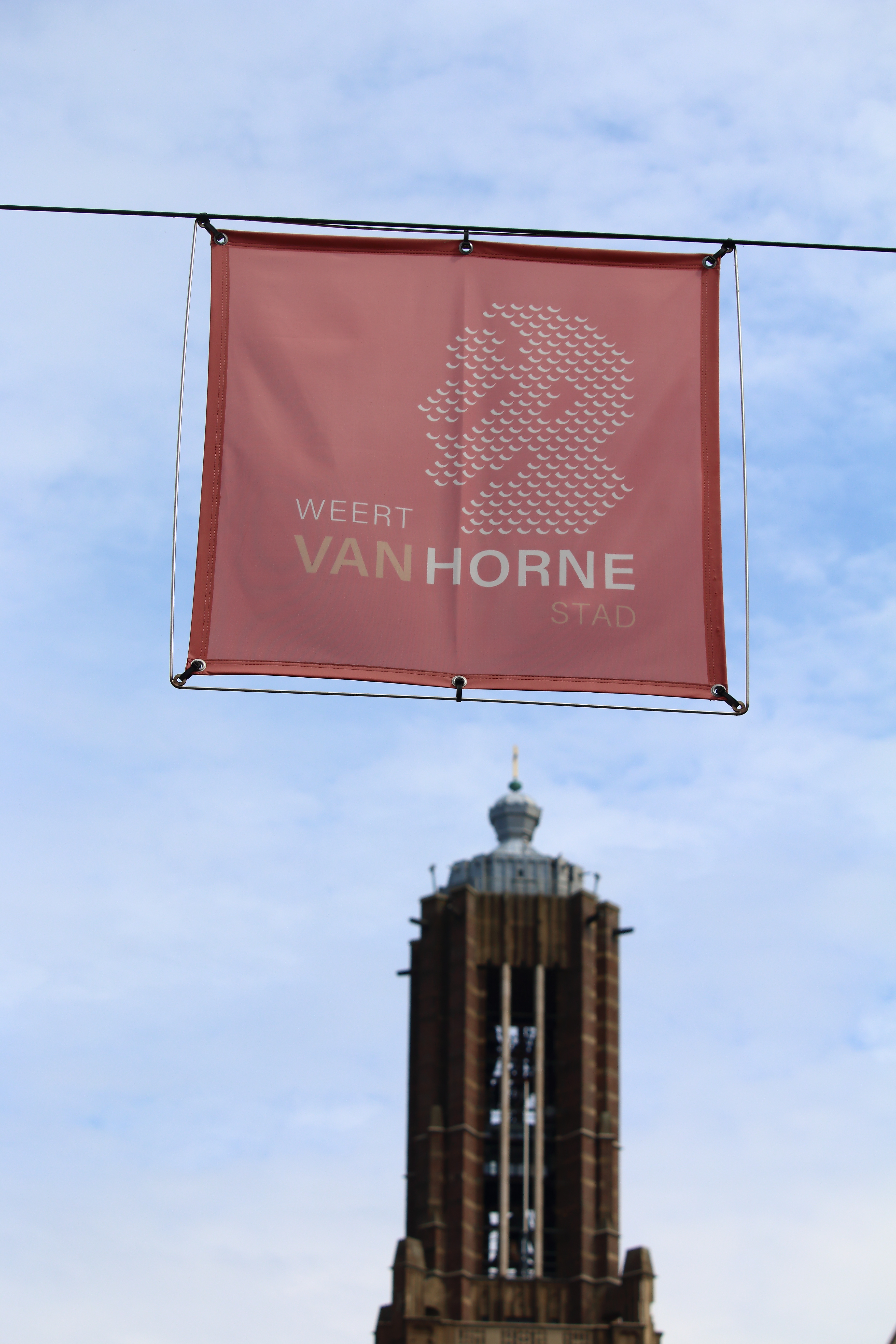 Weert, stad van Philips van Horne/Philips van Montmorency, Limburg, Nederland